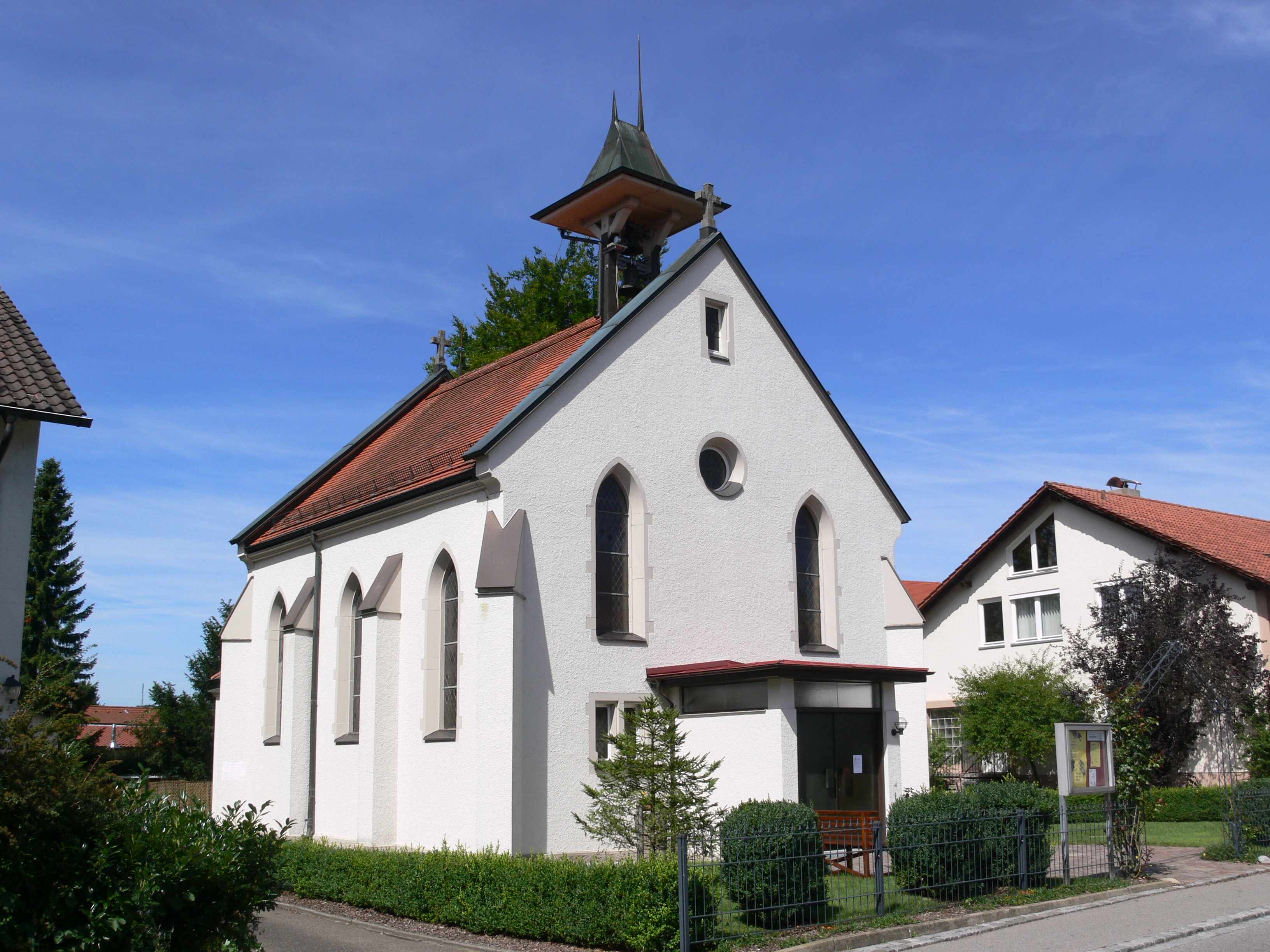 Evangelische Christuskirche, Vogt, Landkreis Ravensburg